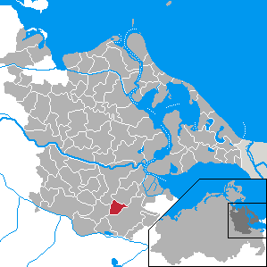 Rossin, Landkreis Ostvorpommern, Mecklenburg-Vorpommern